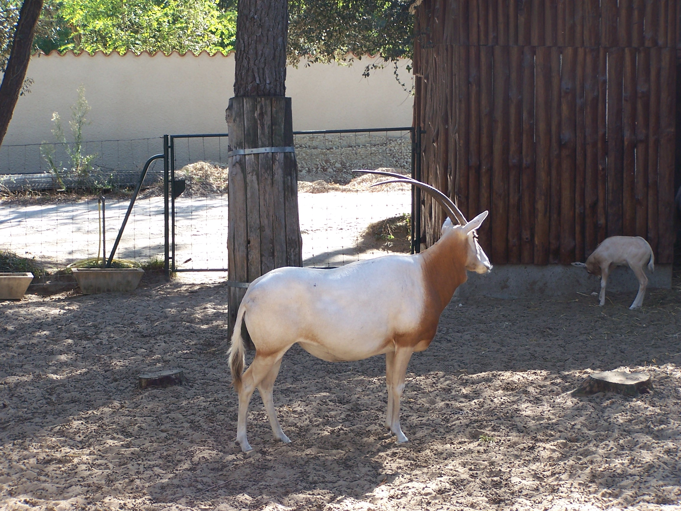 Photographie d'un oryx algazelle (Oryx dammah) prise au Zoo de la Palmyre. L'oryx algazelle vit dans les steppes et le désert du centre du Niger, du Tchad et du sud de la Libye, l'étendue réelle de son lieu de vie est inconnue. Son pelage est court, et sa robe est blanche, avec une poitrine de couleur fauve et des marques noires sur le front et sur le dessus du museau. Ses cornes sont longues, fines, parallèles et incurvées vers l'arrière et peuvent atteindre 1 m à 1,25 chez les deux sexes. Animal herbivore parfaitement adapté à la vie dans le désert, il est capable de faire varier la température de son corps, emmagasinant de la chaleur le jour et la libérant la nuit, afin d'éviter la transpiration (qui est alors nulle en dessous de 40°C). Toujours dans le but d'économiser l'eau, ses urines sont peu abondantes et très concentrées. Les oryx algazelles chassés pour leurs cornes, sont proche de l'extinction. Autrefois ils occupaient tout le Sahara, aujourd'hui cette espèce est éteinte à l'état sauvage. Des projets de réintroduction sont toutefois en cours dans des parcs nationaux du Maroc et de Tunisie.